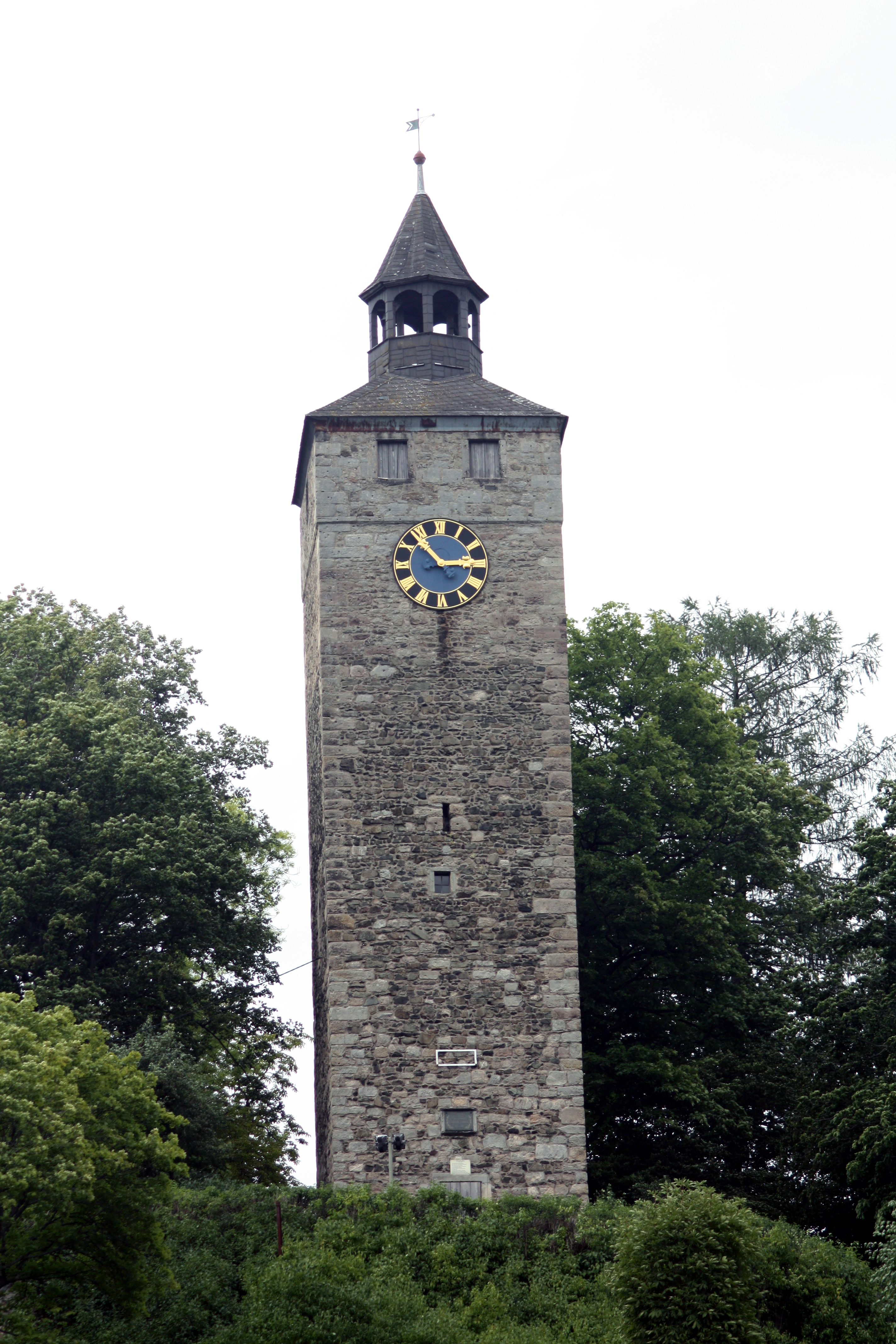 Schlossturm zu Bad Berneck